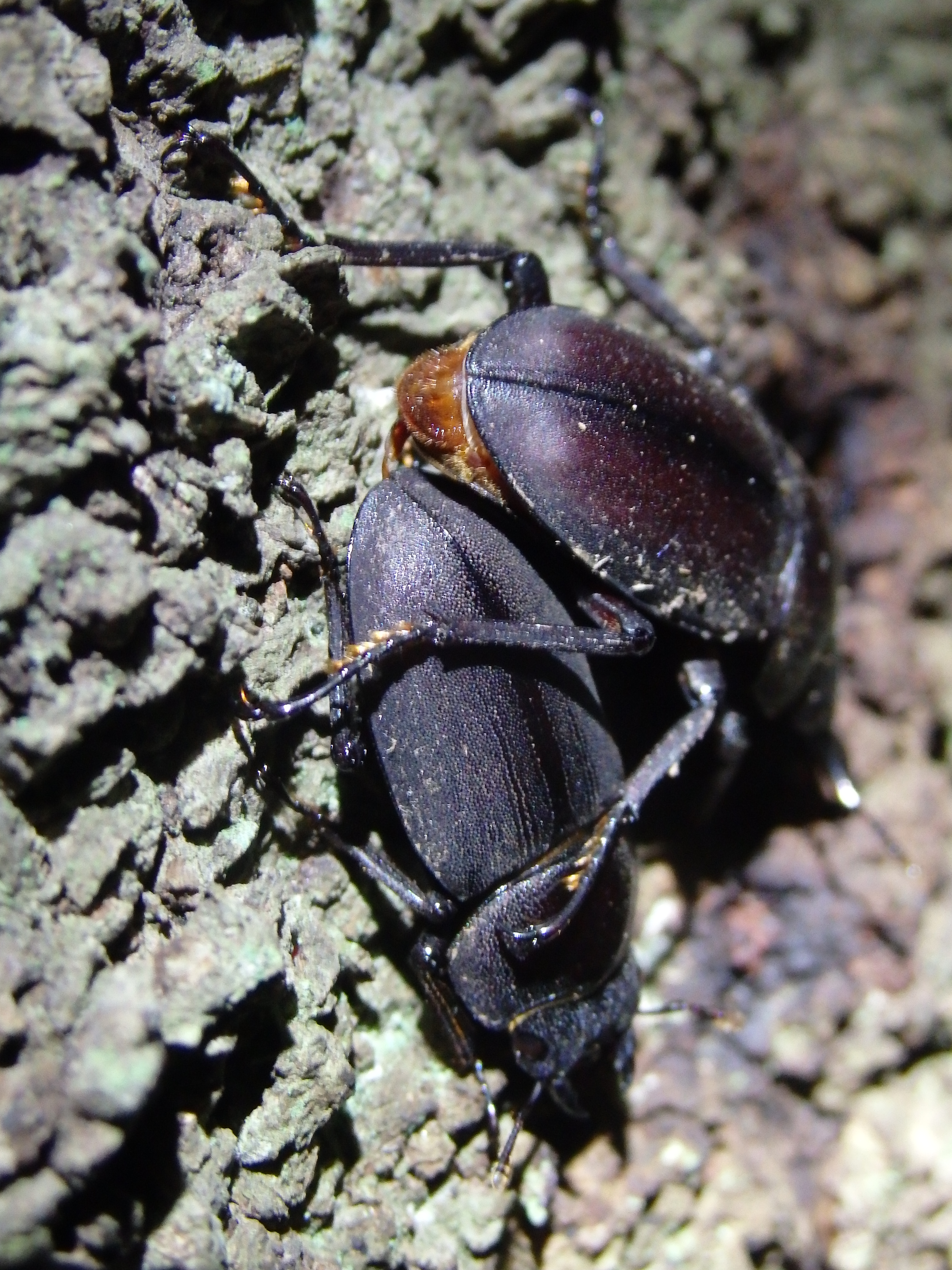 交尾するコクワガタ（撮影地：東京）